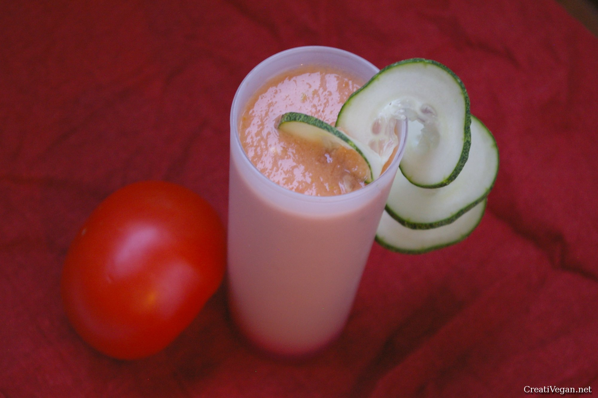 gazpacho para beber